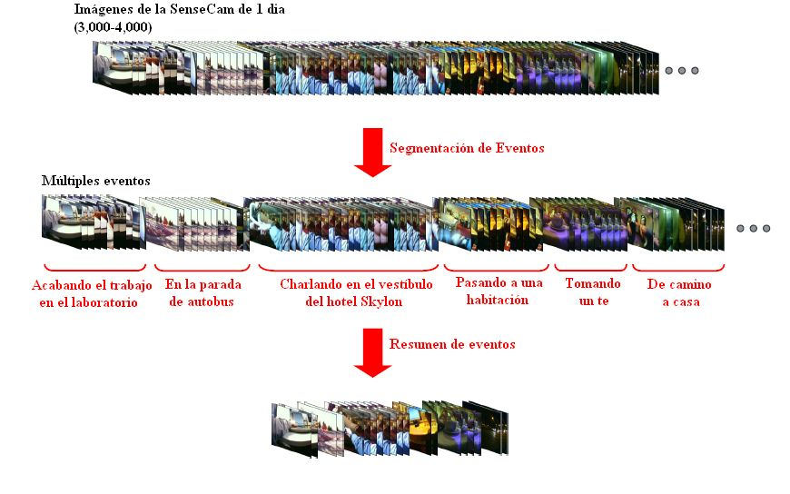 Metodo de reducción de imagenes de la SenseCam